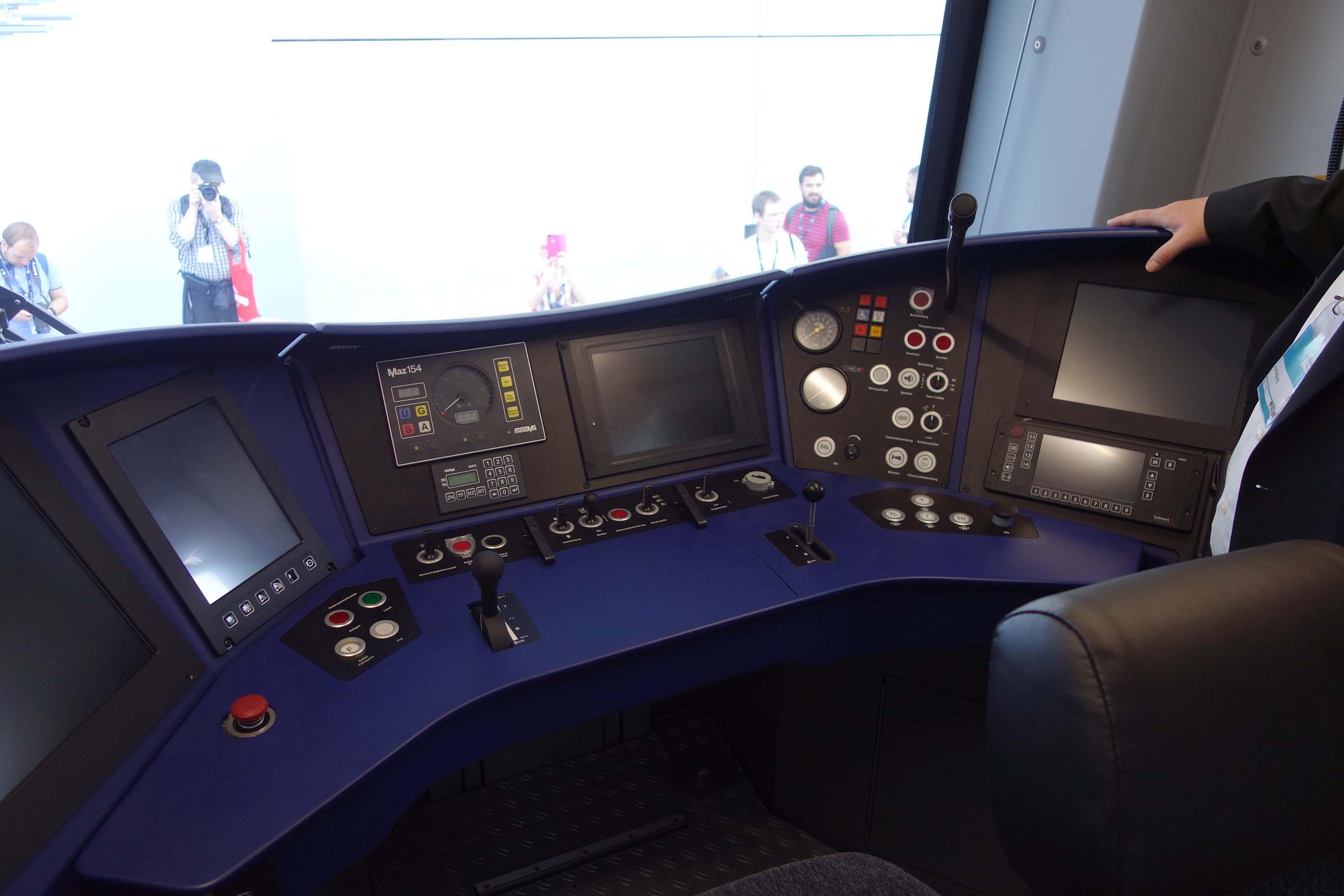 DB-Baureihe 484 für die S-Bahn Berlin auf der InnoTrans 2018, Führerstand